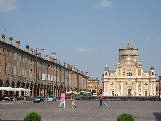 Carpi, Piazza dei Martiri, la terza piazza più grande d'Italia.